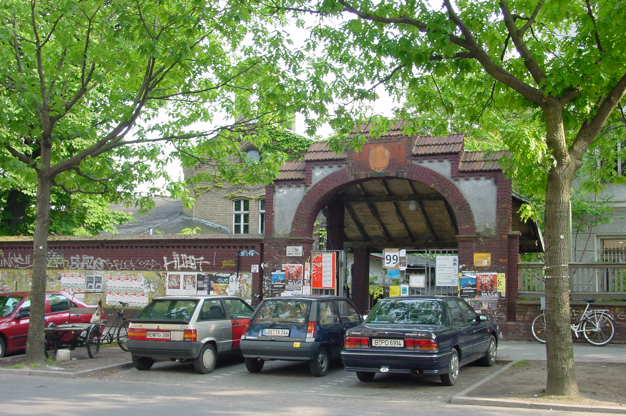 Das einzige erhaltene Werkstor des ehemaligen Reichsbahnausbesserungswerkes Franz Stenzer in Berlin- Friedrichshain, Revaler Strasse 99, erbaut um 1913